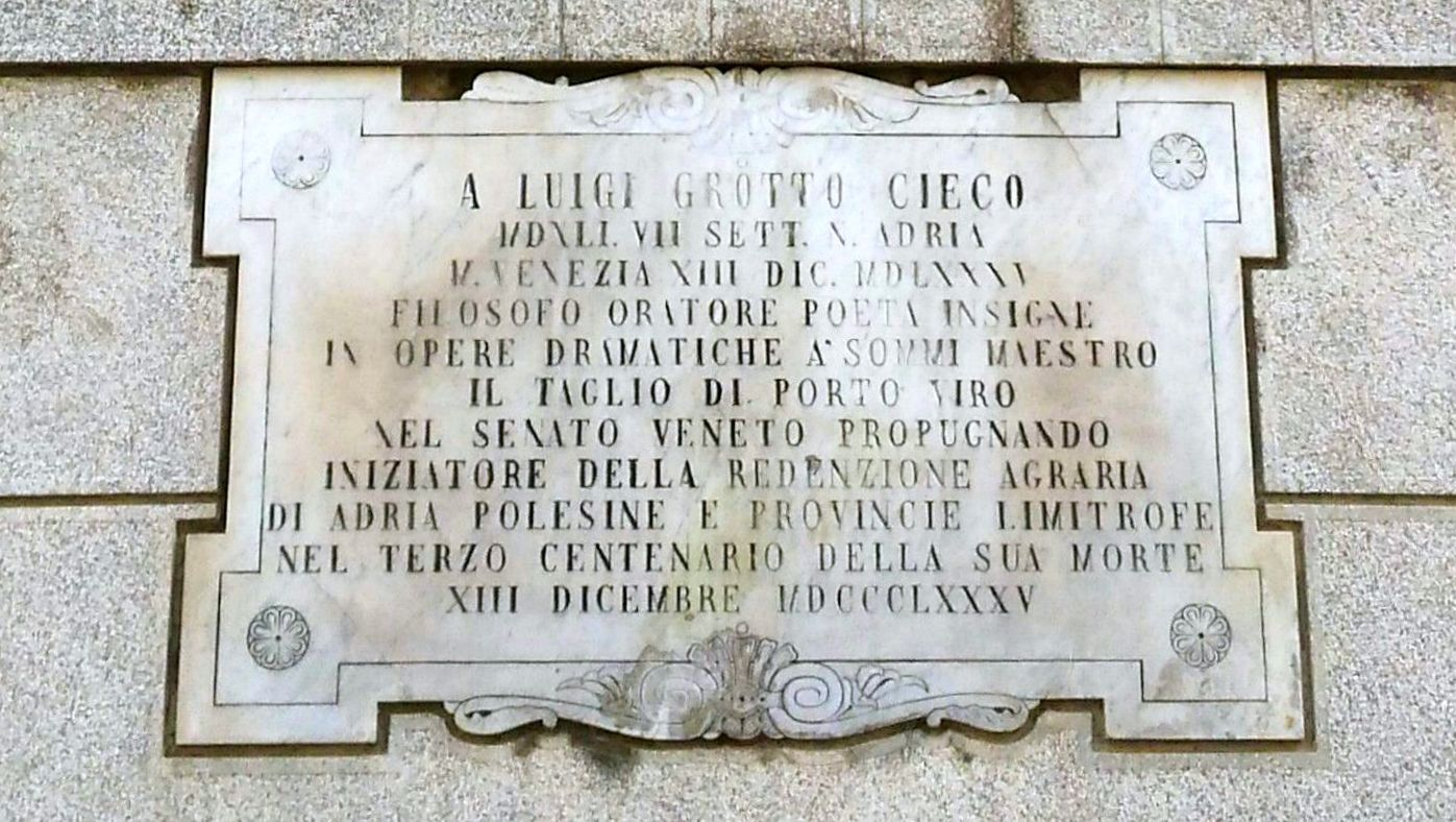 Adria, piazza Cieco Grotto: lapide in memoria dello storico adriese Luigi Grotto, detto Cieco Grotto, sito nell'omonima piazza.